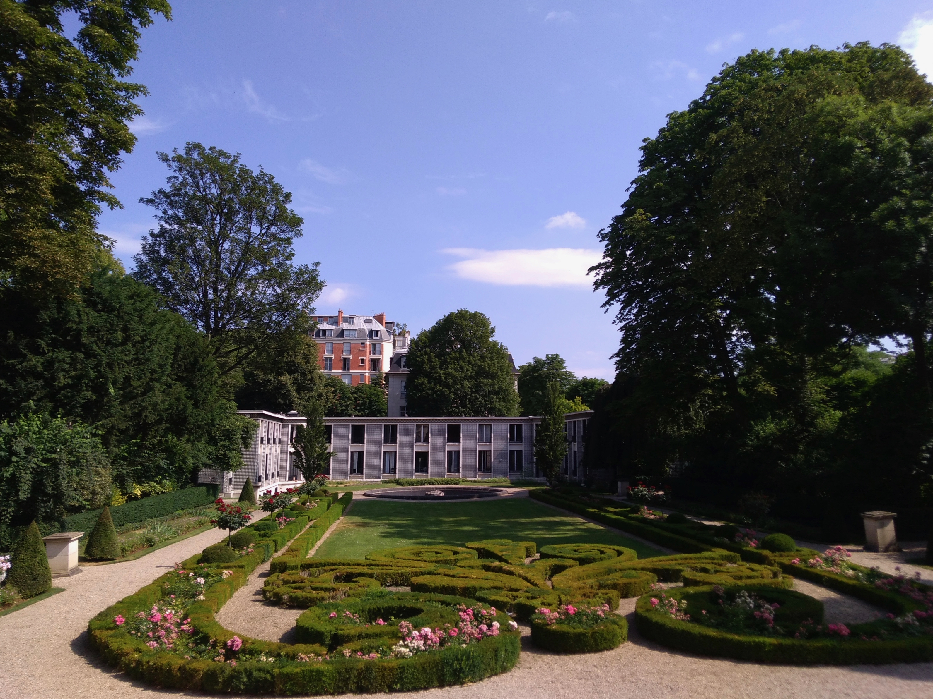 juillet 2018